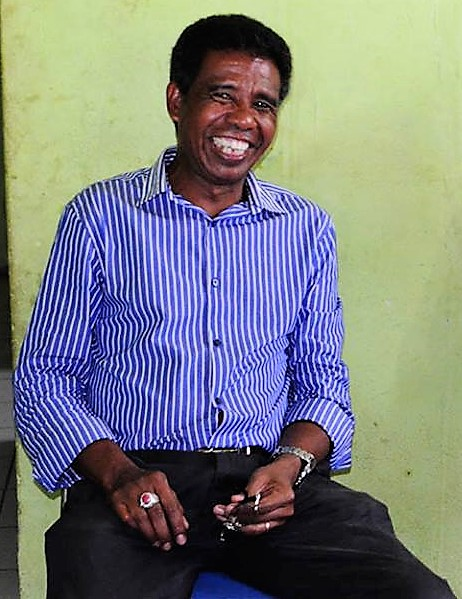 António da Conceição, Bildungsminister Osttimors